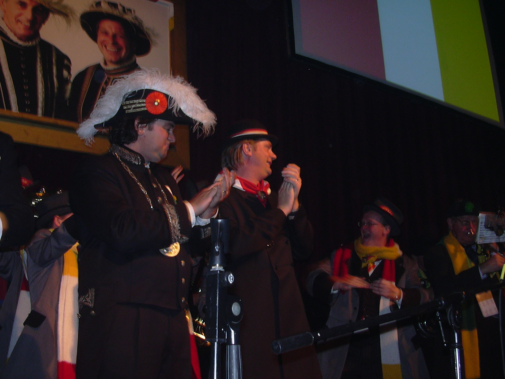 Foto van Peer vaan den Muggenheuvel tot den Bobberd en zijn Assessor Kees Minkels. Zelf genomen op het Kwekfestijn in 2005, Theater aan de Parade.